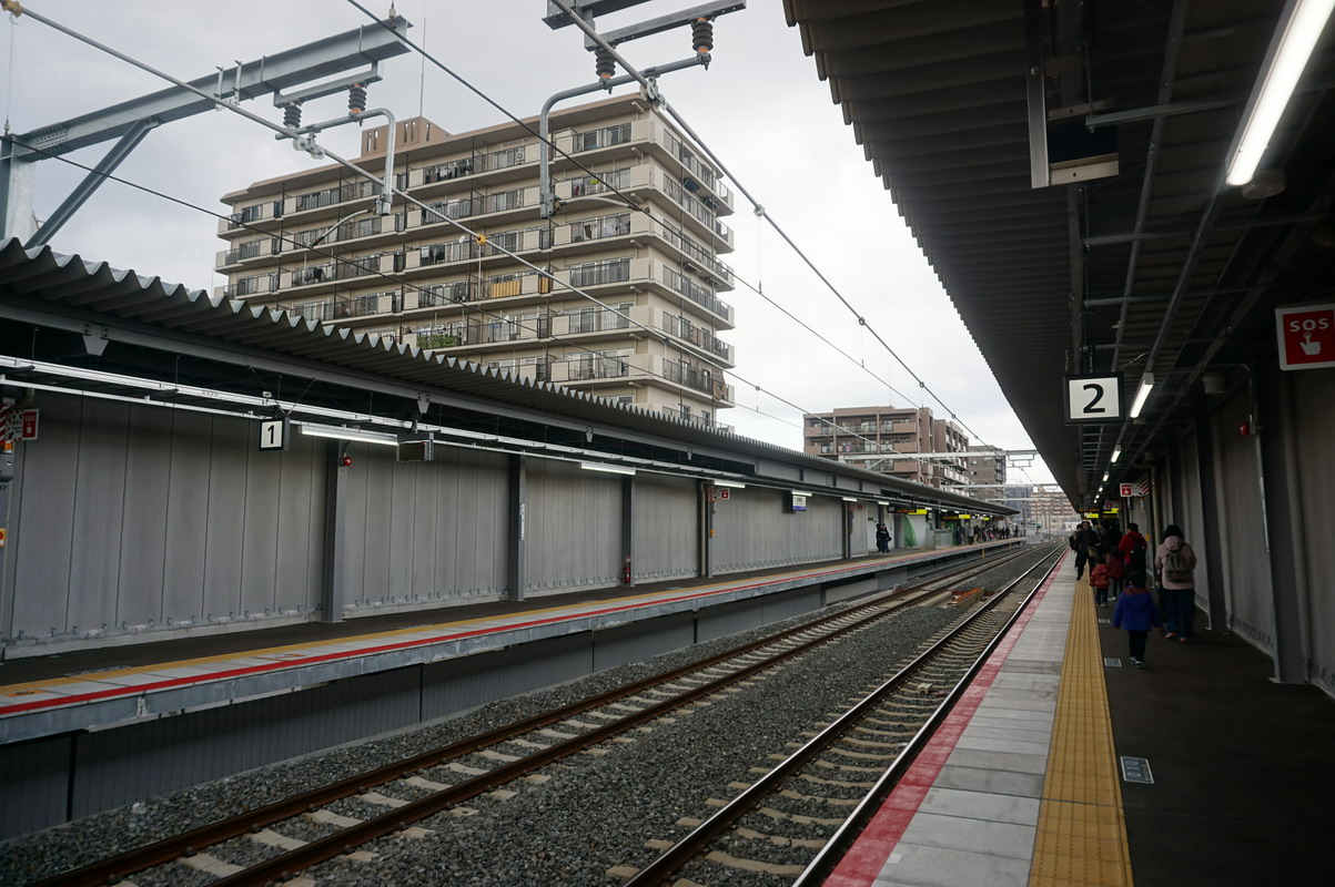 2019年3月16日撮影 Sony ILCE-6000